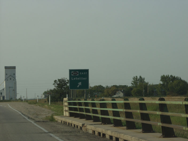 Letellier, Manitoba. From